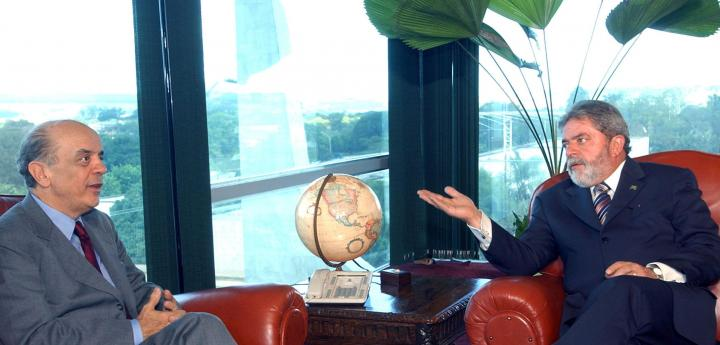 Brasília - O presidente Luiz Inácio Lula da Silva recebe em audiência o prefeito eleito de São Paulo, José Serra, no Palácio do Planalto. Foto: José Cruz/ABr.